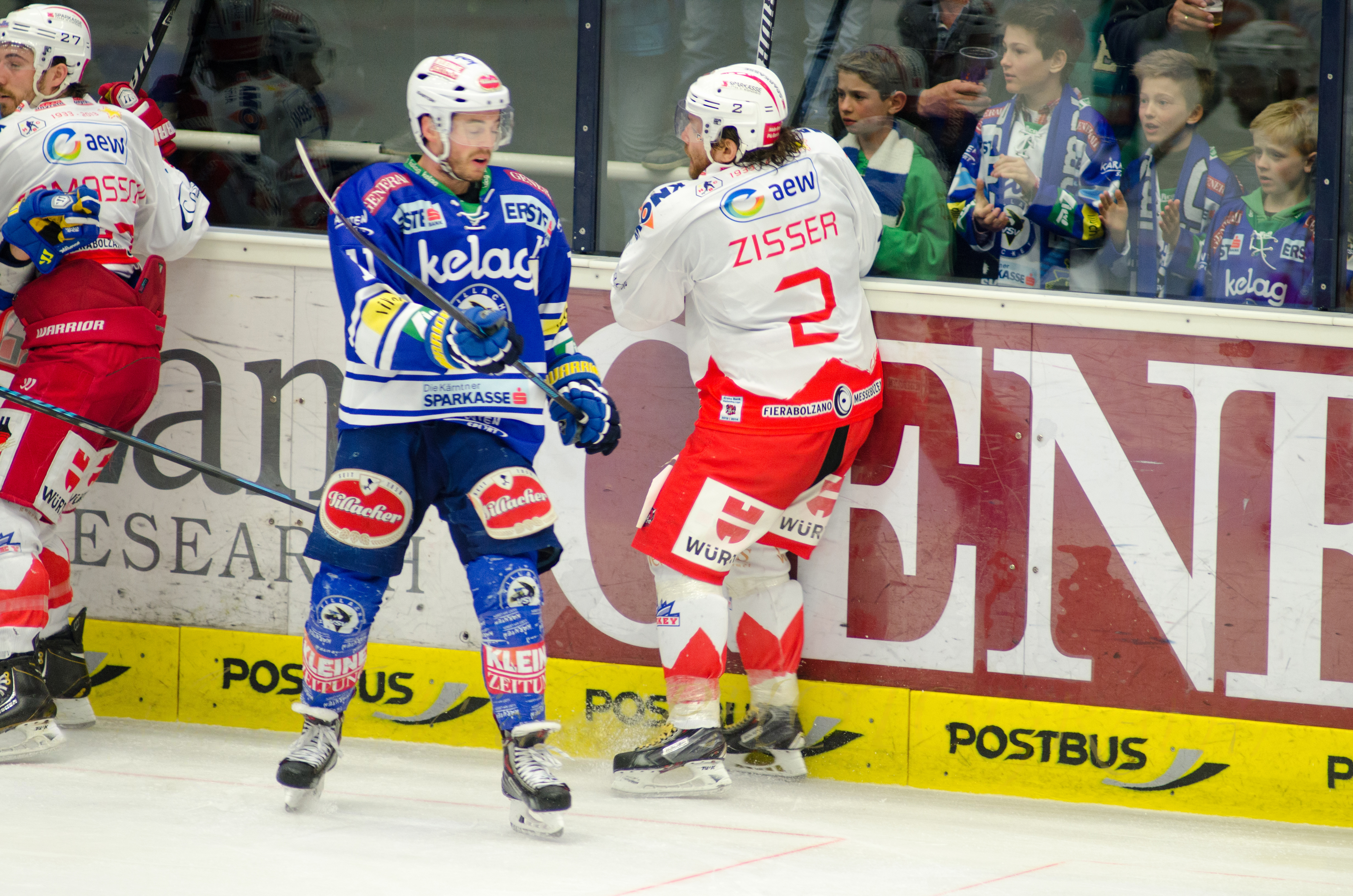 Derek Ryan (VSV) and Stefan Zisser (HCB), EC VSV vs HCB Südtirol, 25-03-2014